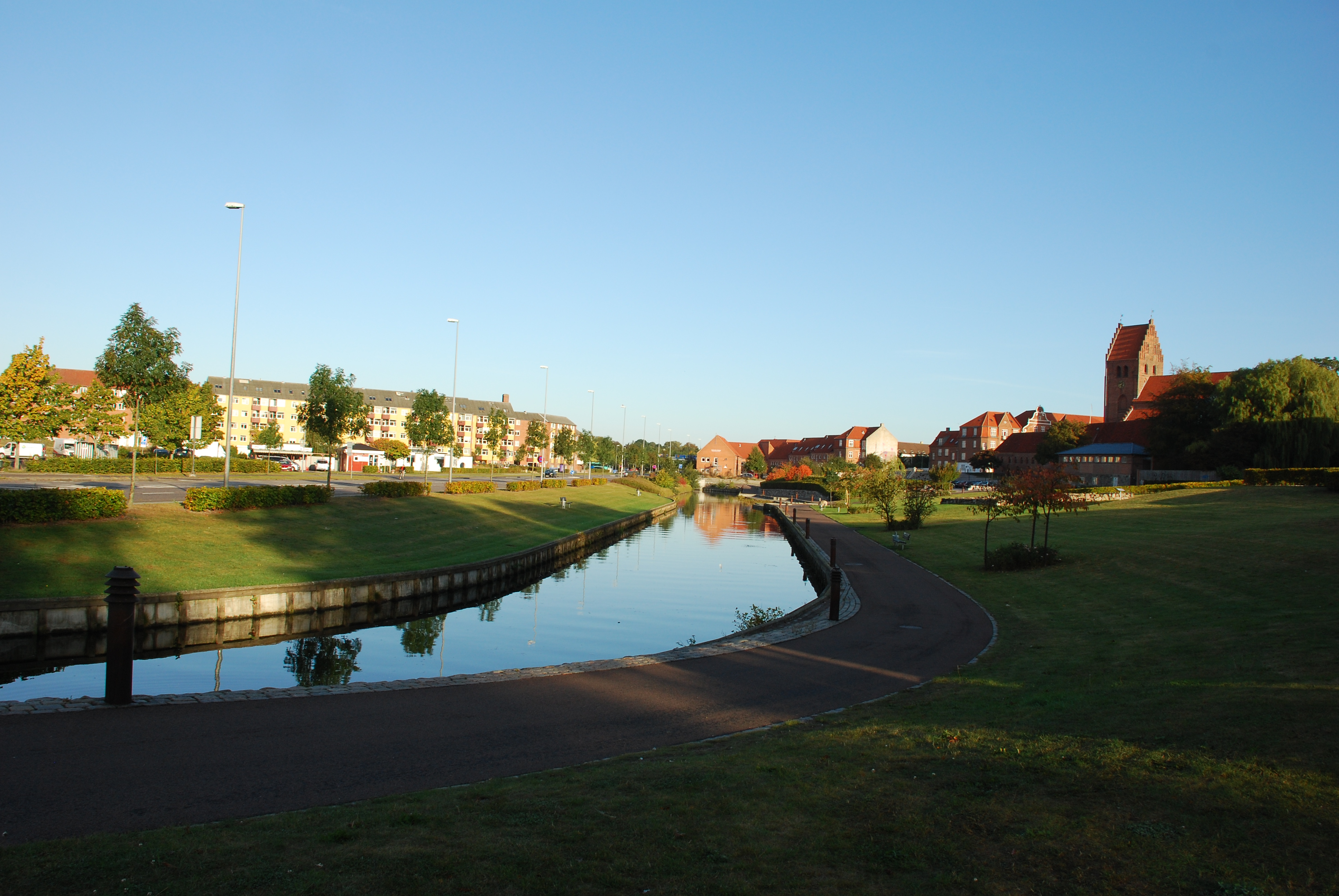 Den fritlagte del af Suså nær Næstved bymidte. I baggrunden Skt. Peders Kirke.